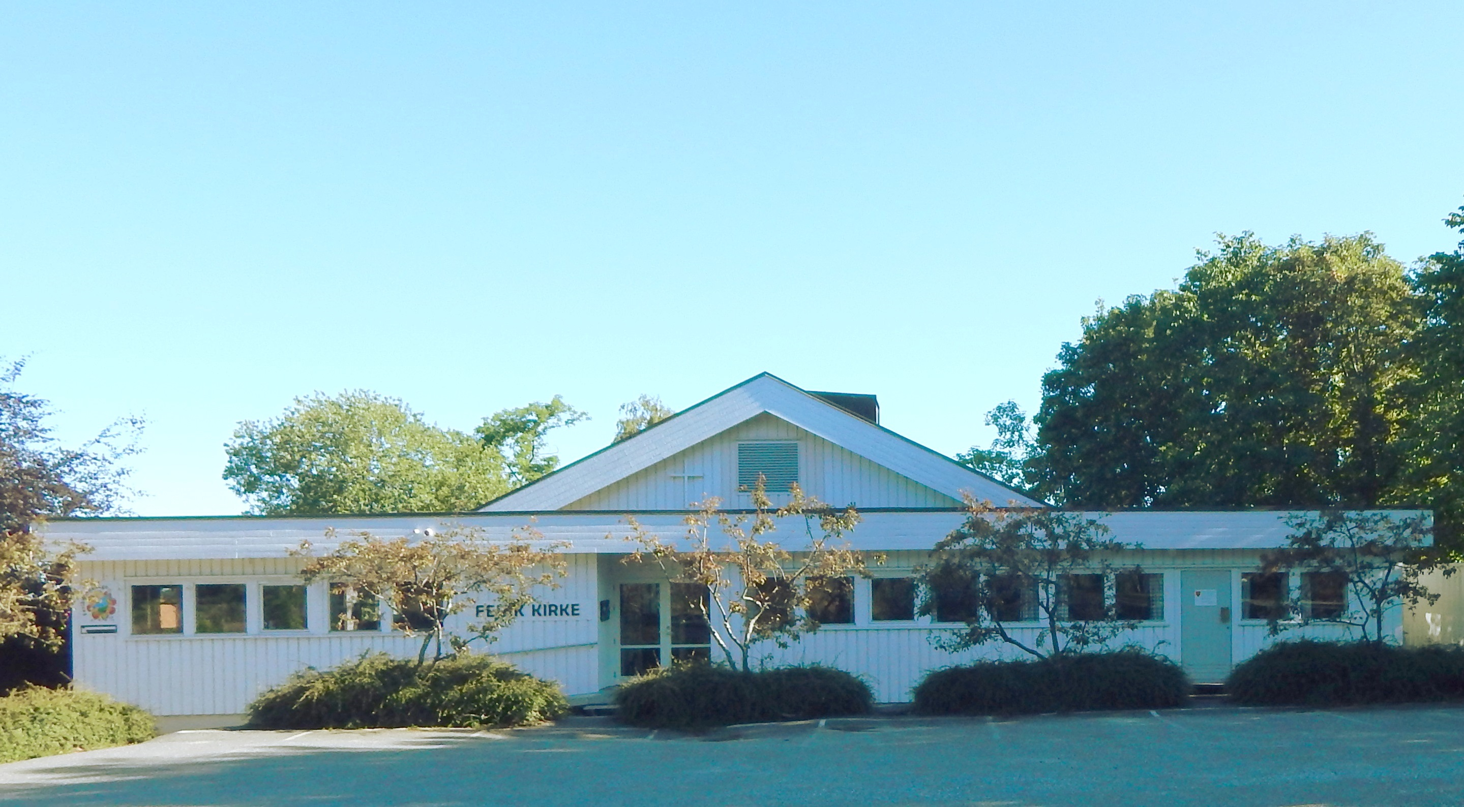 Fevik kirke